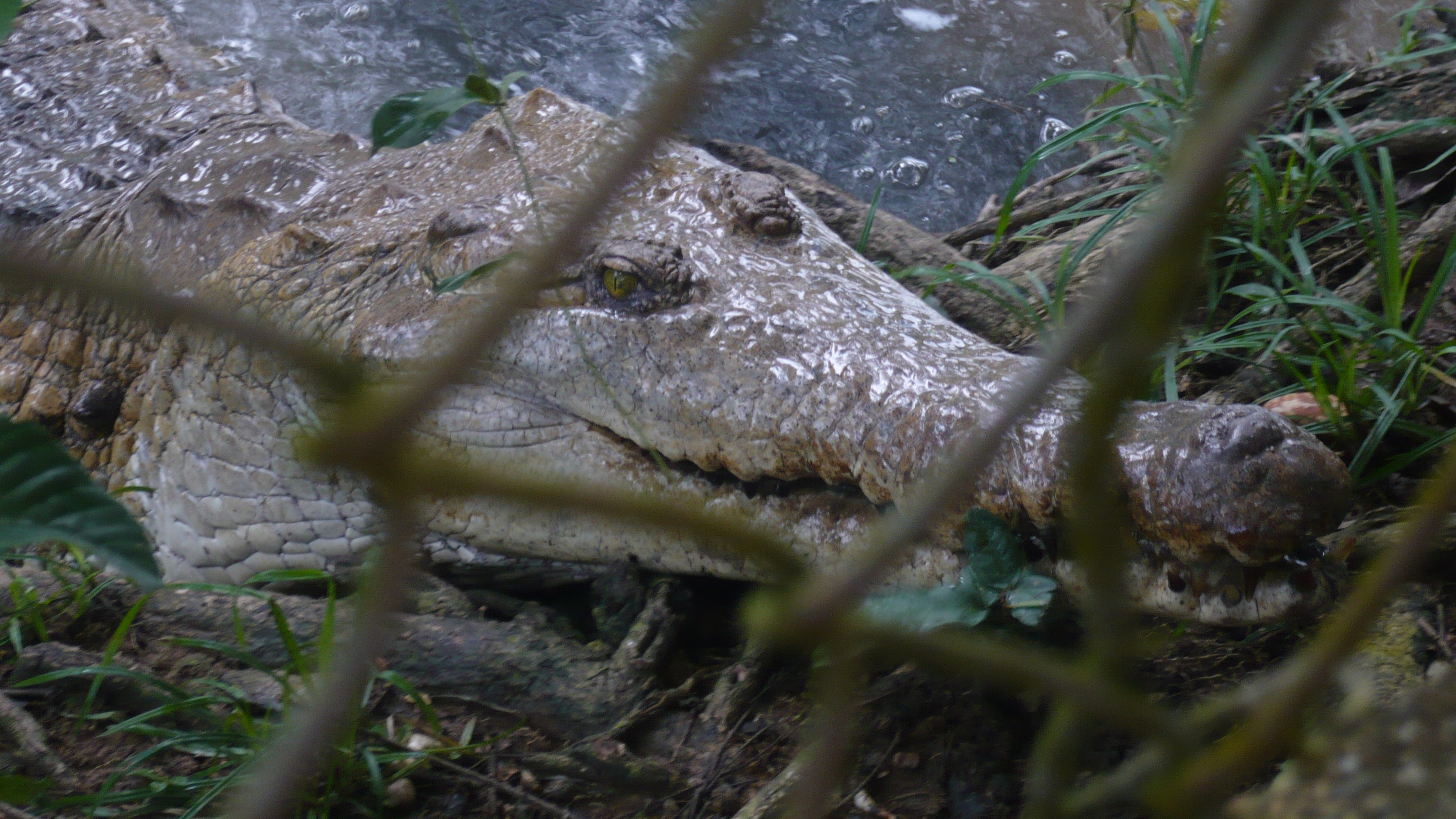 una de las especies mas grandes de aproxiamdamente 6 metro de lago y pude pesar igual a dos hombres